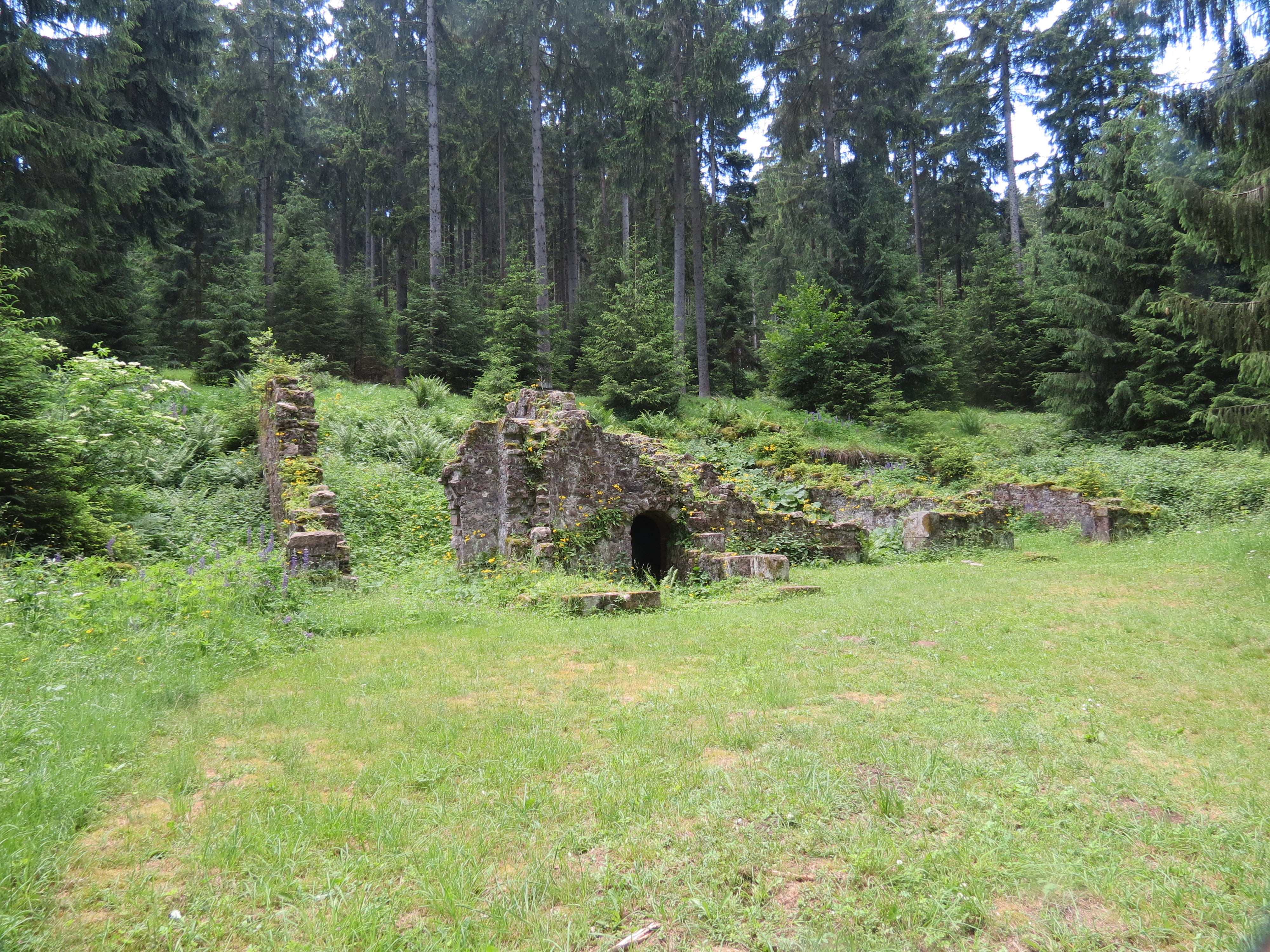 Ruinen des ehemaligen Berghofes Lange Bahn bei Suhl-Heinrichs, Suhl, Thüringen